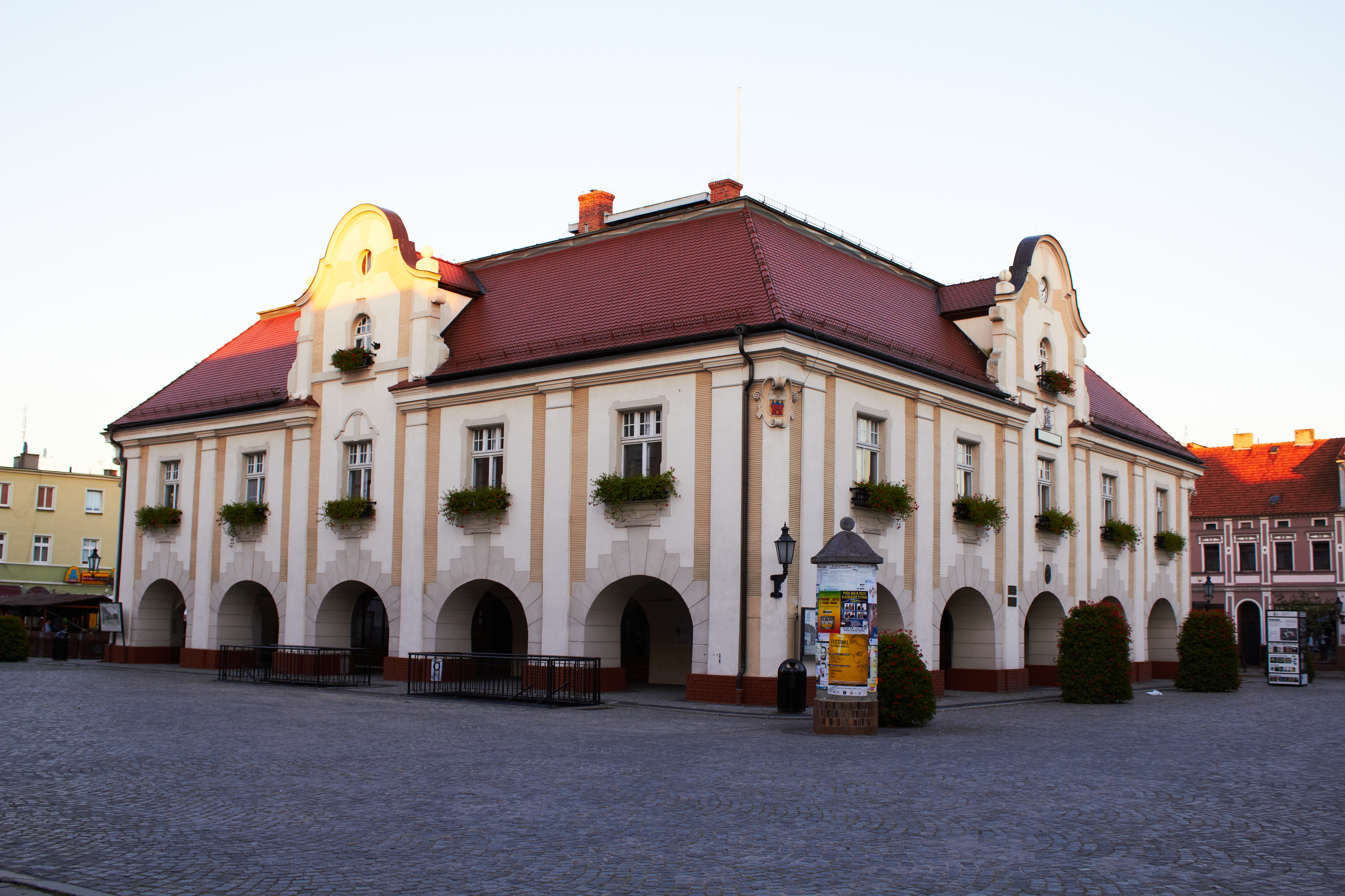 Jarocin, ratusz, 1799-1804